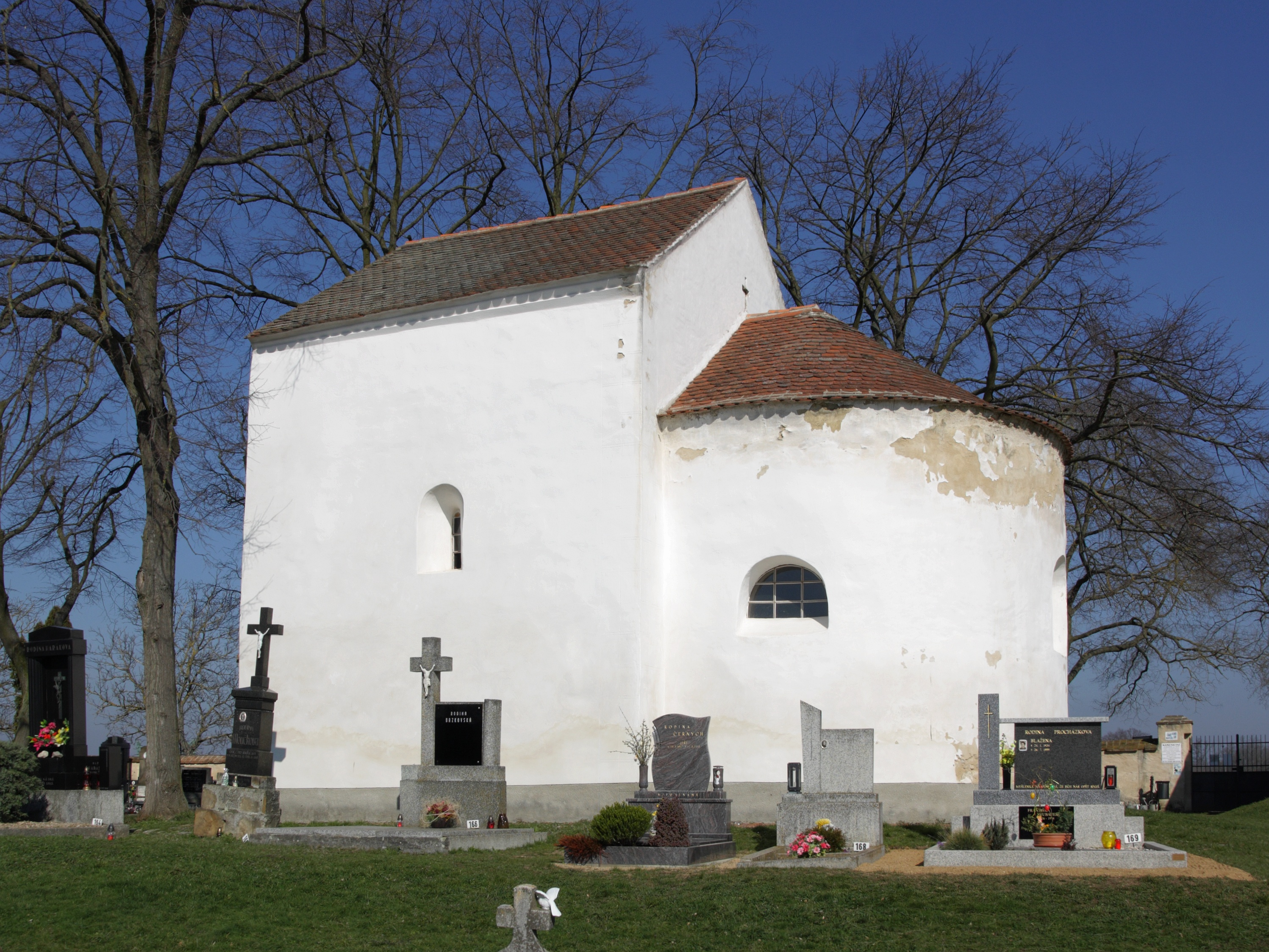 Rybníky (okres Znojmo) - kaple svaté Markéty.